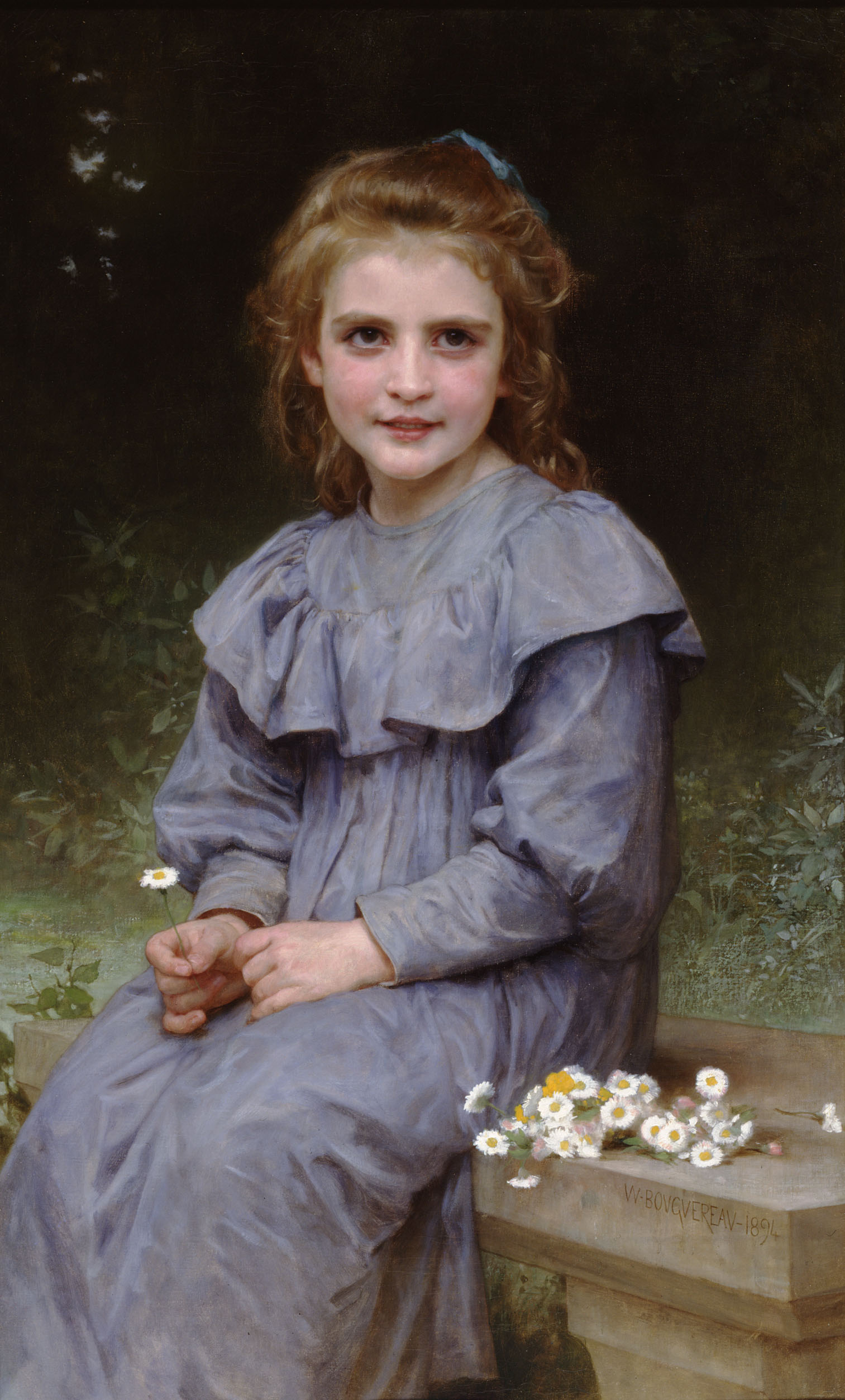 Pâquerettes (french for "daisies") by William-Adolphe Bouguereau.